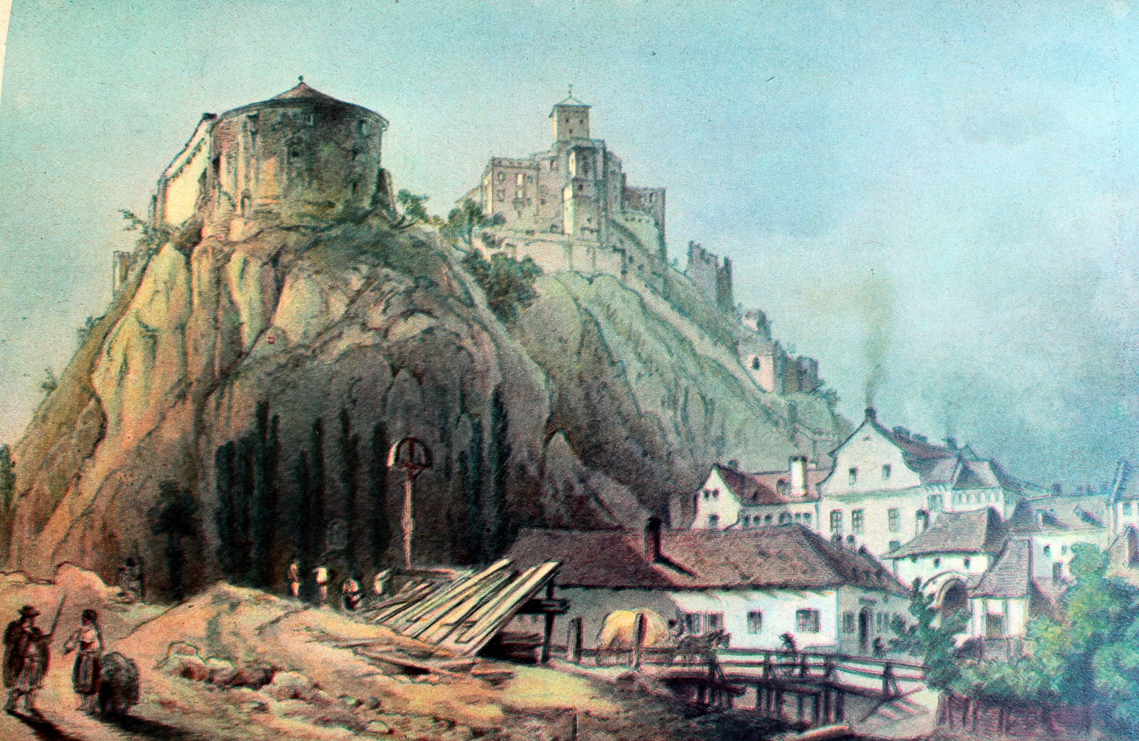 Château de Trencsén, litographie anglaise du milieu du XIXe siècle - Galerie des tableaux historiques, Budapest